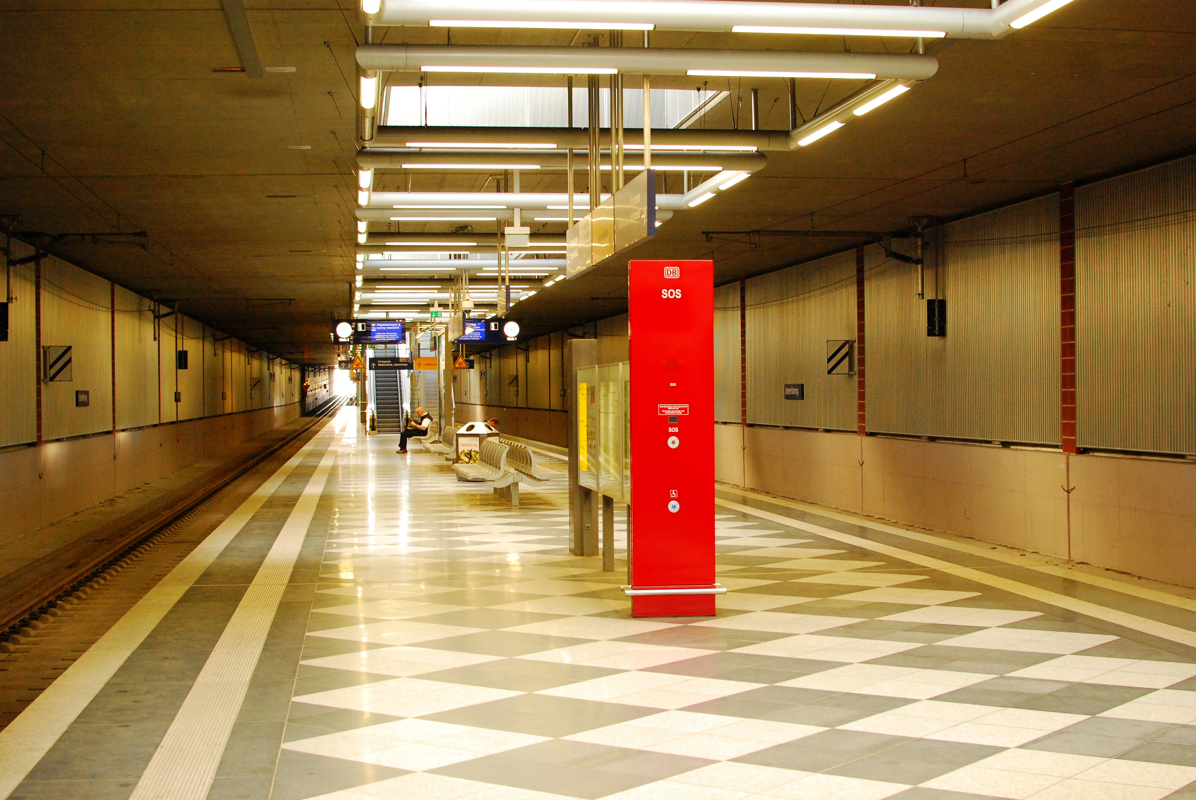 Tunnelbahnhof in Unterföhring, Landkreis München, Regierungsbezirk Oberbayern, Bayern.